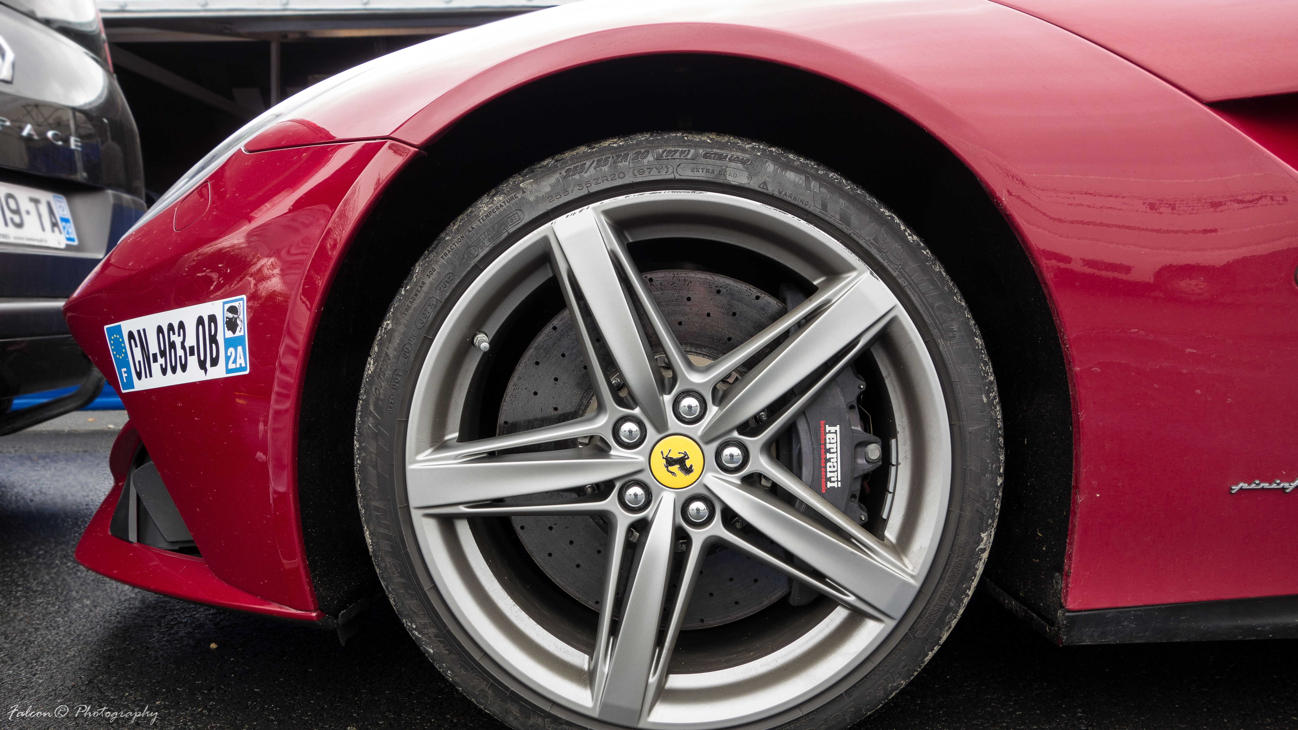 Finales Nascar Whelen Euro Series 2013 au Mans